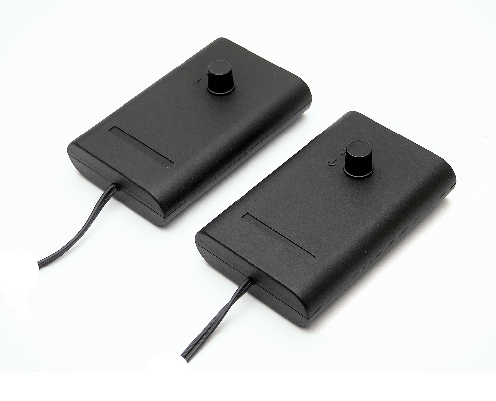 Interton V350 Fernbedienung